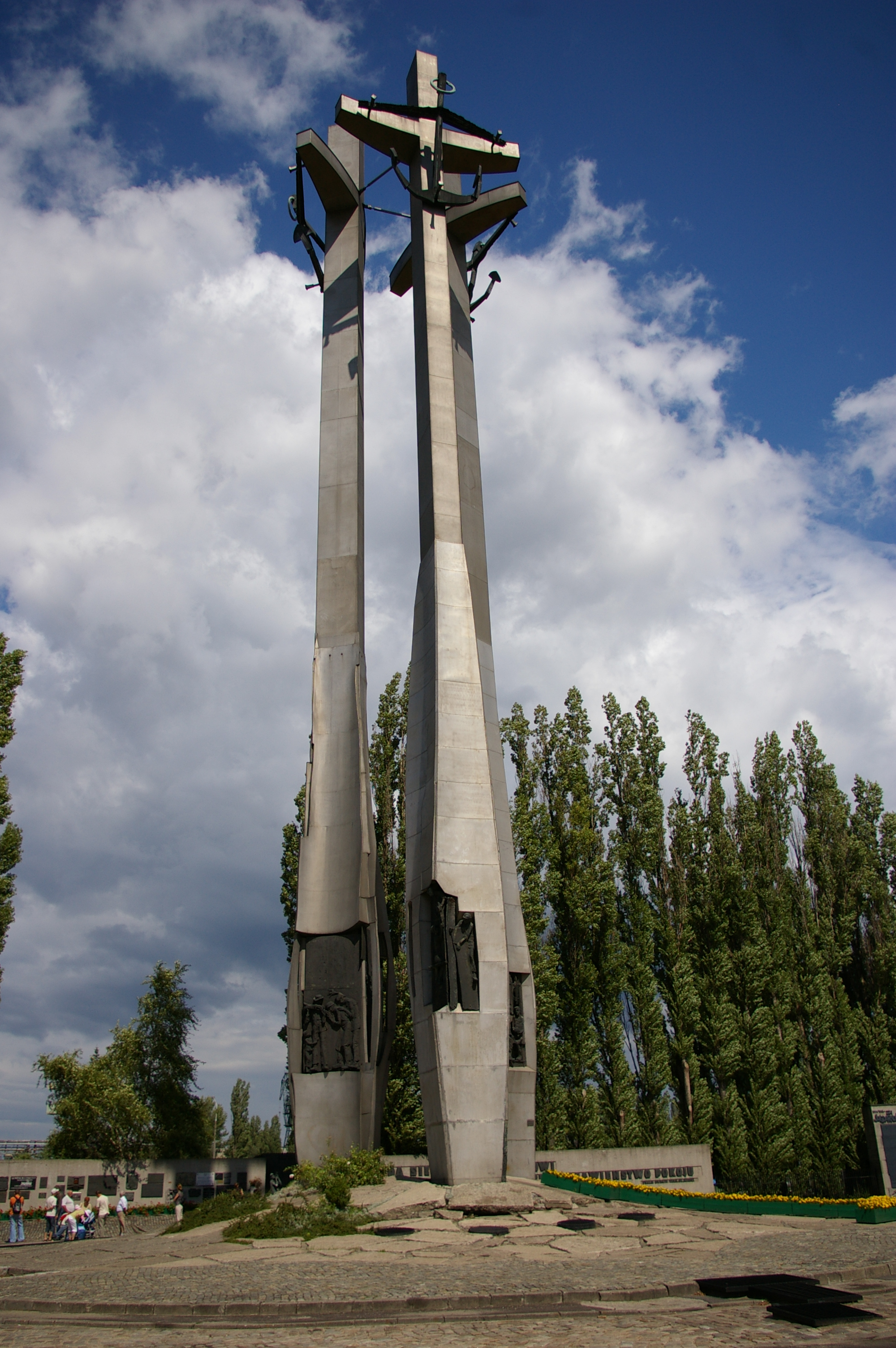 Pomnik Ofiar Grudnia 1970 w Gdańsku na Placu Poległych Stoczniowców